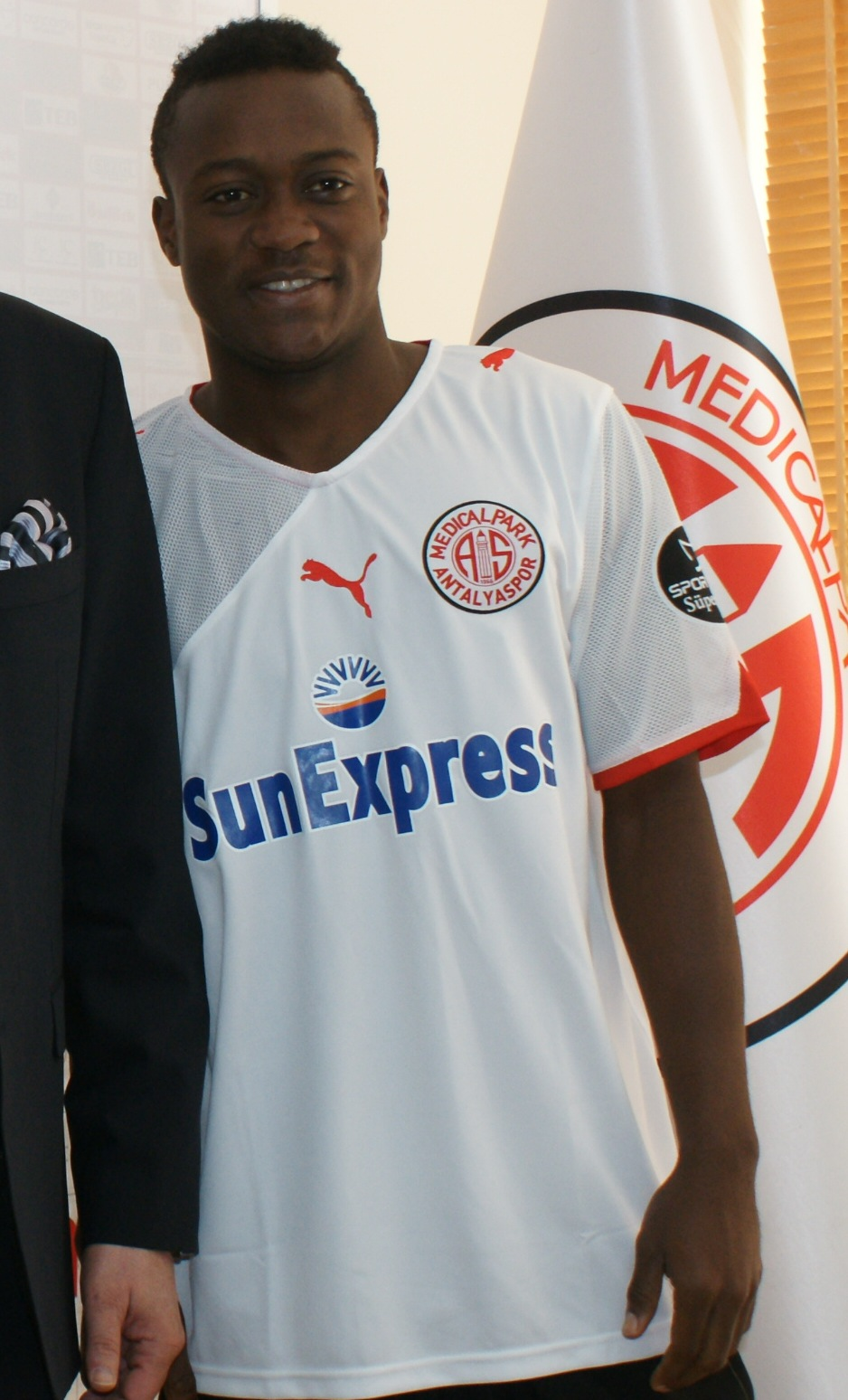 Kodjo - İmza töreni Photo: Murat Özgen